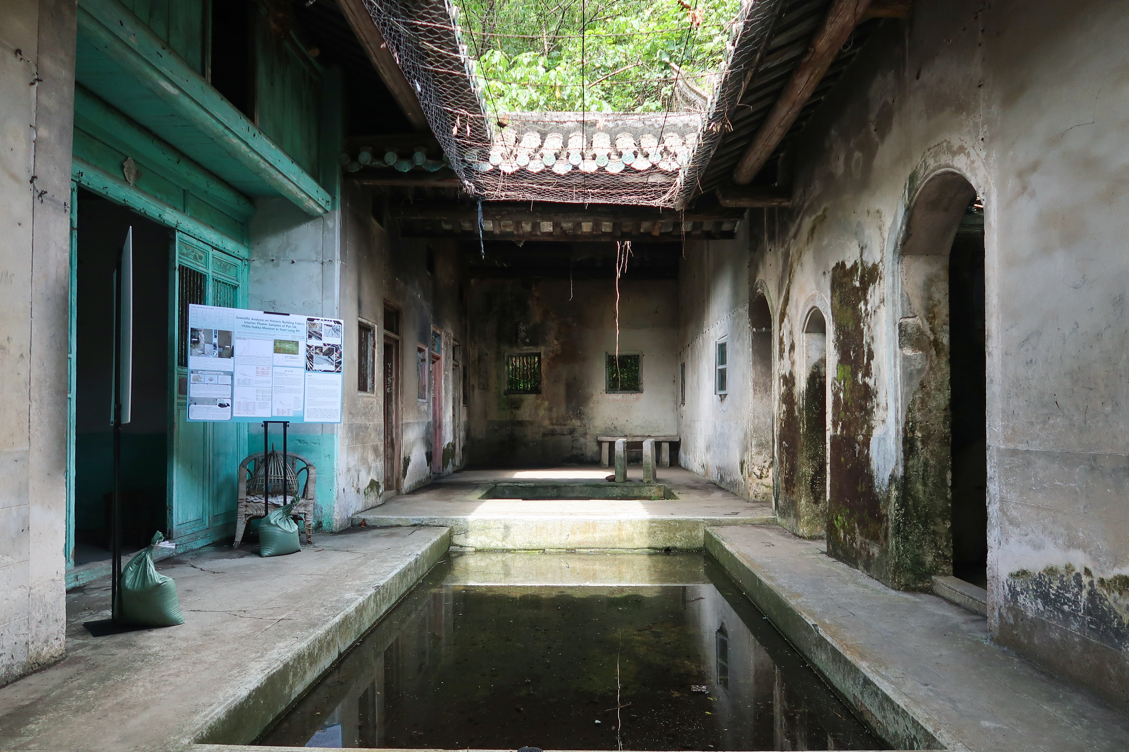 Pun Uk Mansion